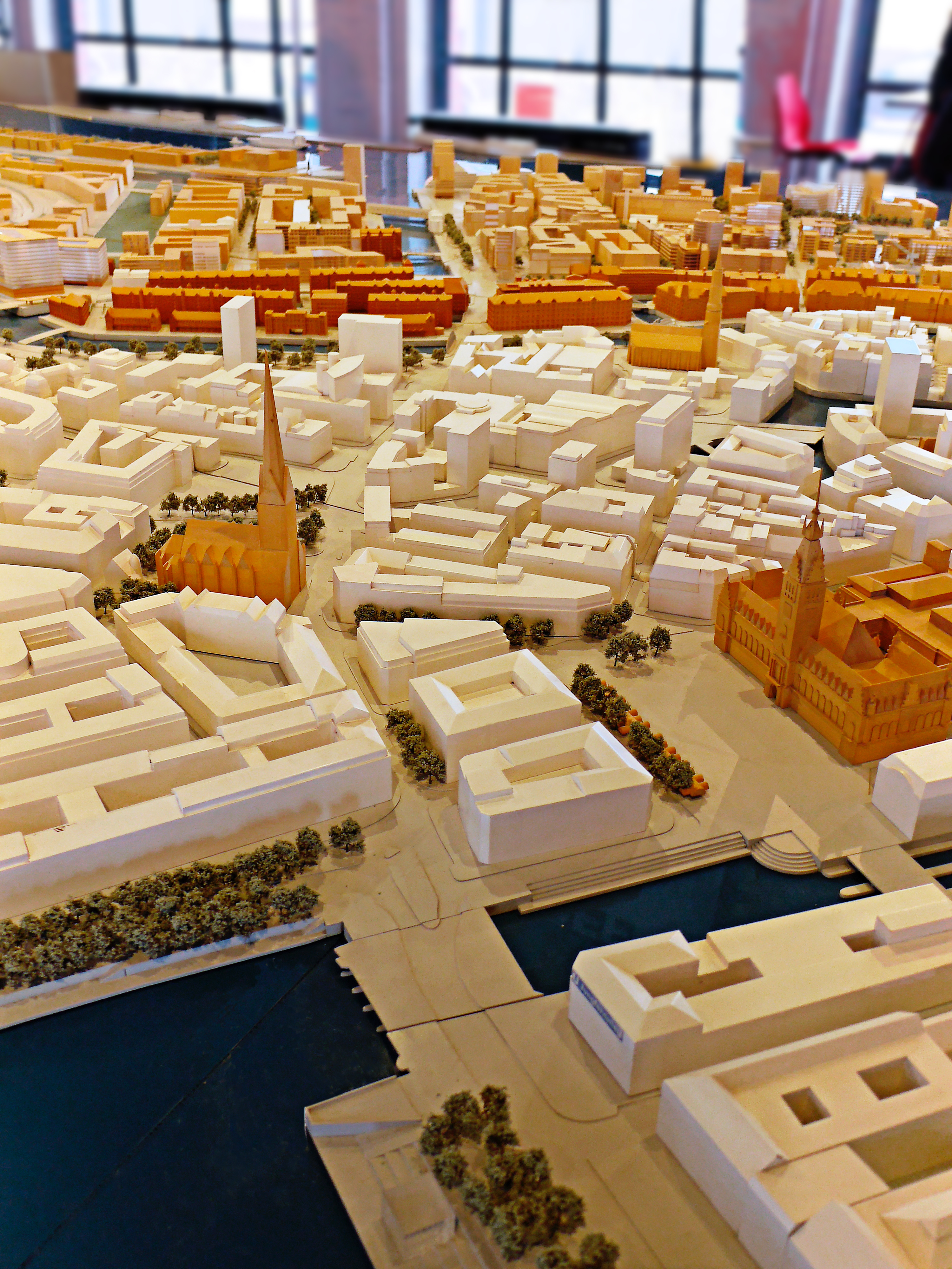 Modell der Hamburger Innenstadt und der HafenCity.